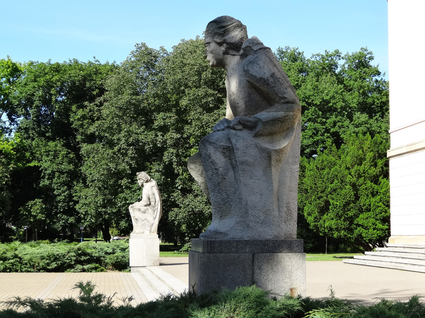 Rzeźby: Fryderyka Chopina i Ignacego Jana Paderewskiego przed Filharmonią Pomorską w Bydgoszczy